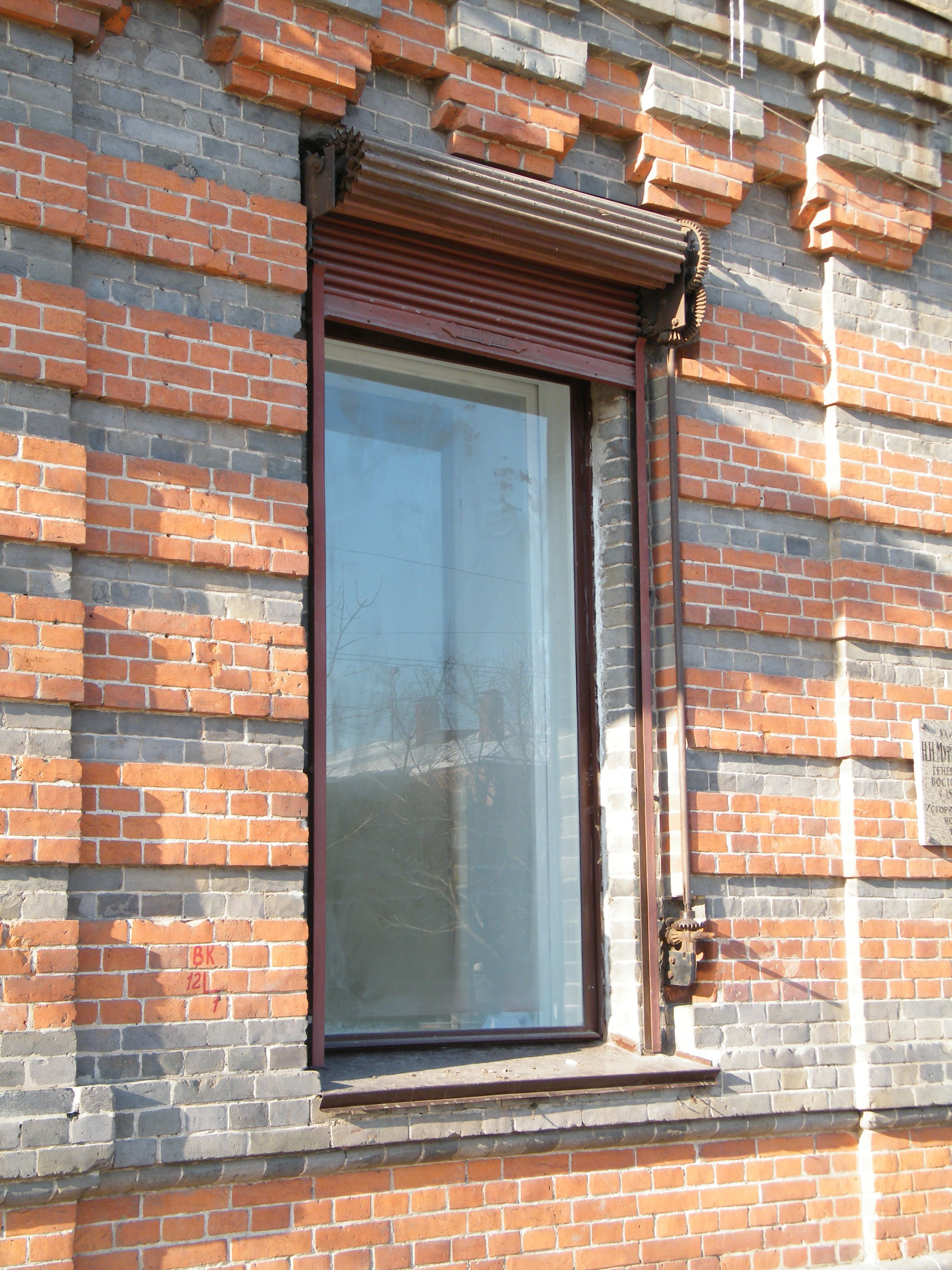 Рольставни в Хабаровске, 1902 год